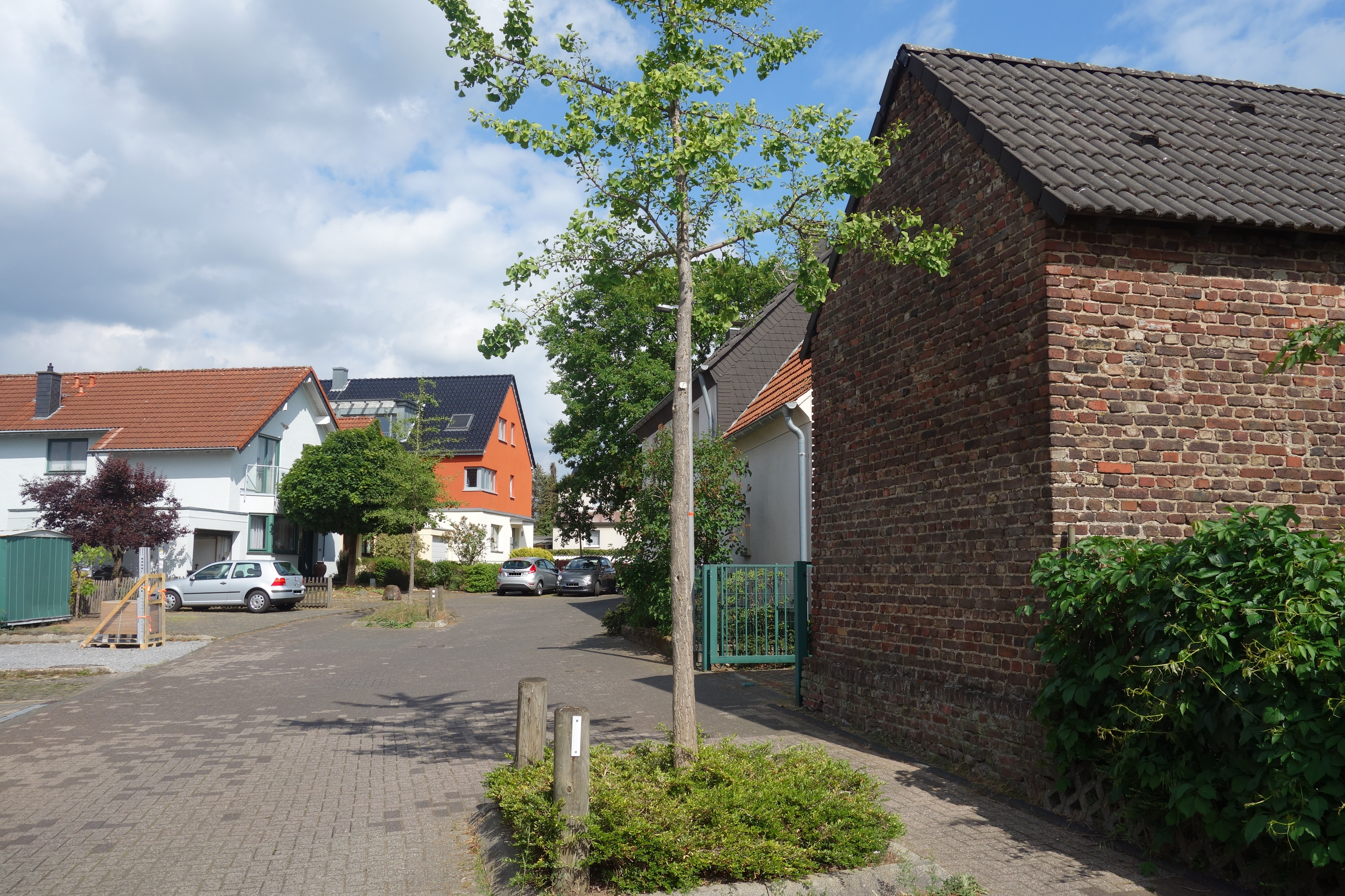 Broicher Feld